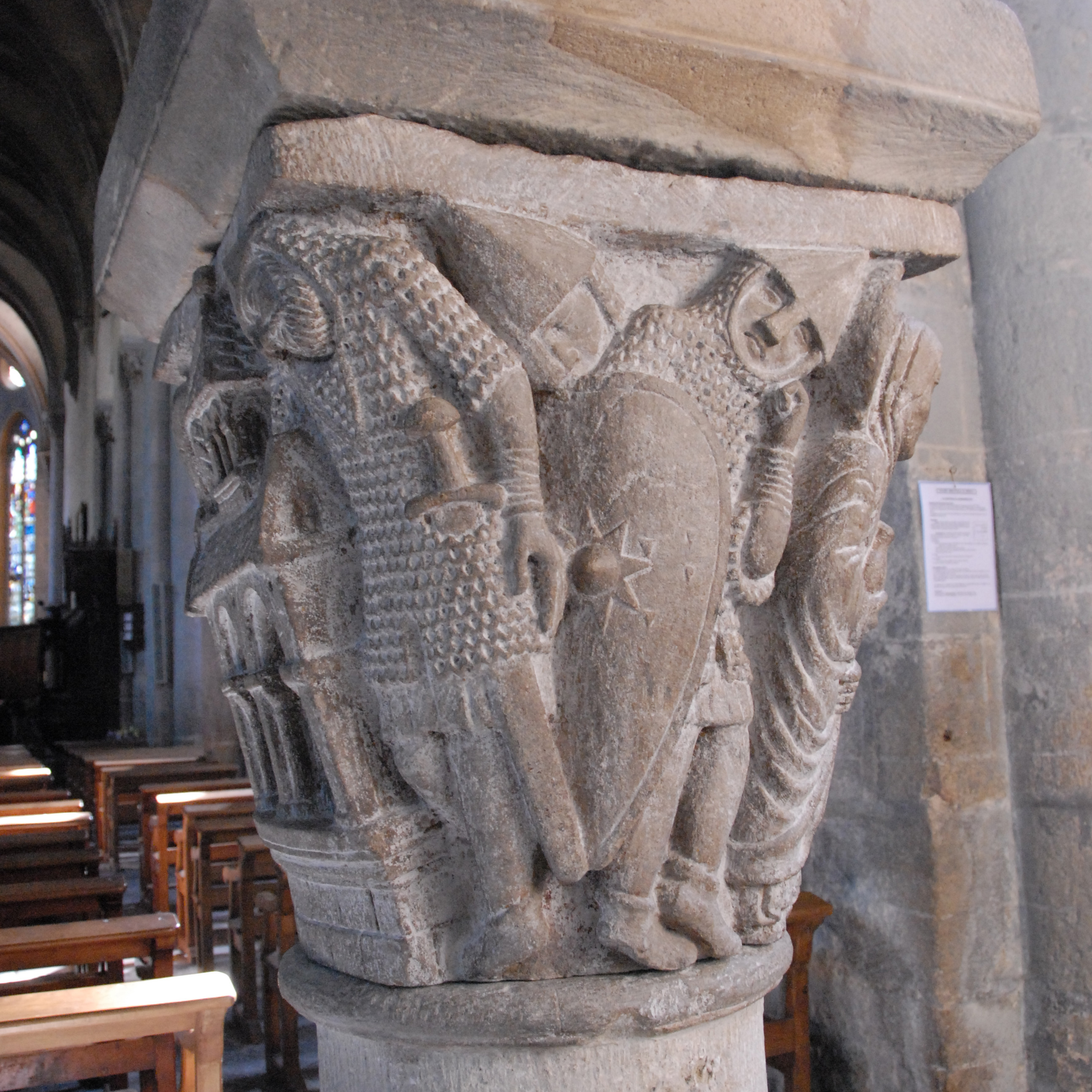 Mozac, Kapitrll 2, Auferstehung, schlafende Wächter